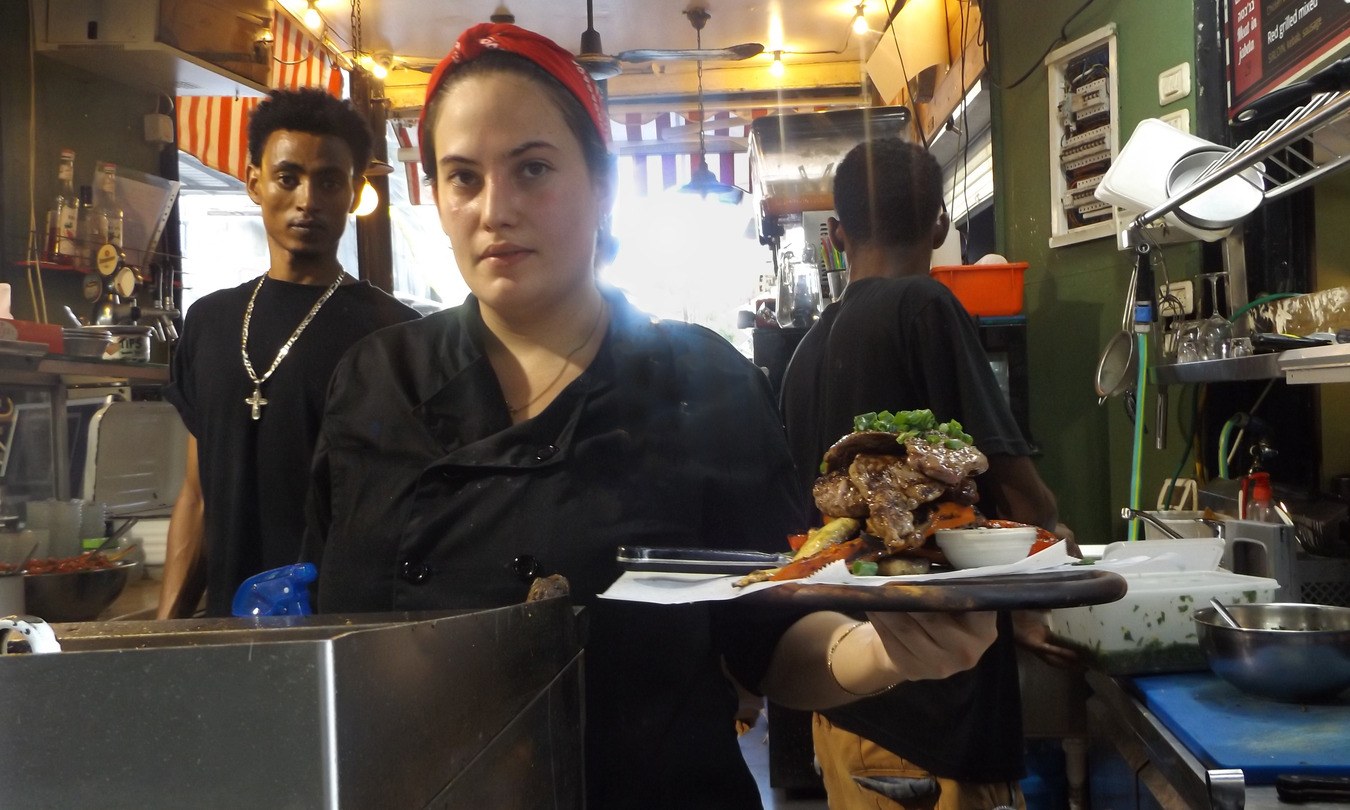 אוראל המאוי תיכון רוטברג שוק הכרמל